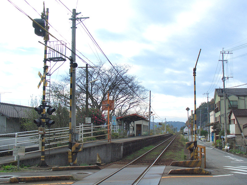 JR三角線波多浦駅 ホーム 手前が熊本駅方面 撮影者/著者/著作権保有者 : MK Products (本人がアップロード) 撮影日 : 2006/12/12 波多浦駅用にアップロードした画像です。良い画像があれば別の画像に変えてください。